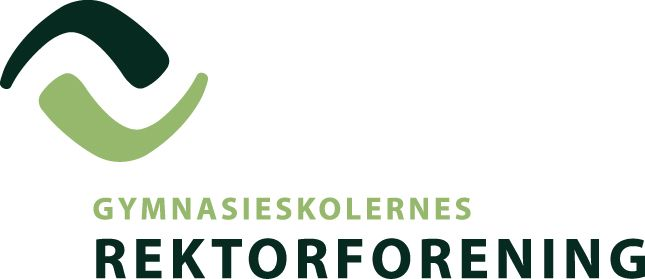 Logo